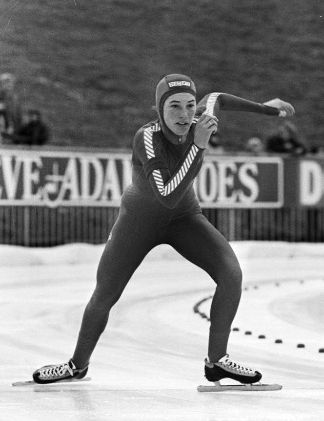 Wereldkampioenschappen schaatsen junioren allround in Assen. Sarah Docter (Verenigde Staten) in actie.